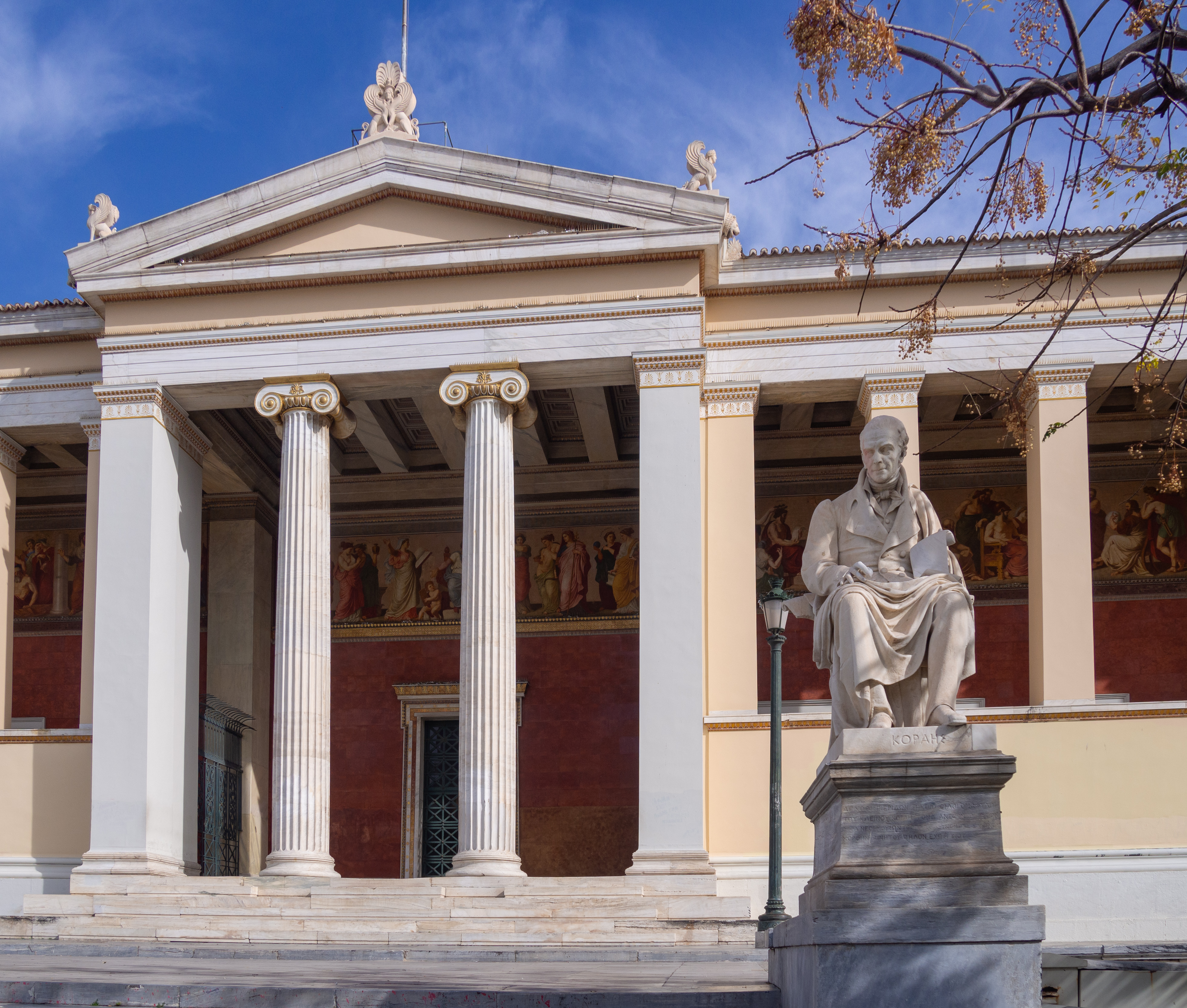 Εθνικό και Καποδιστριακό Πανεπιστήμιο Αθηνών«Κτίριο Εθνικού και Καποδιστριακού Πανεπιστημίου Αθηνών»